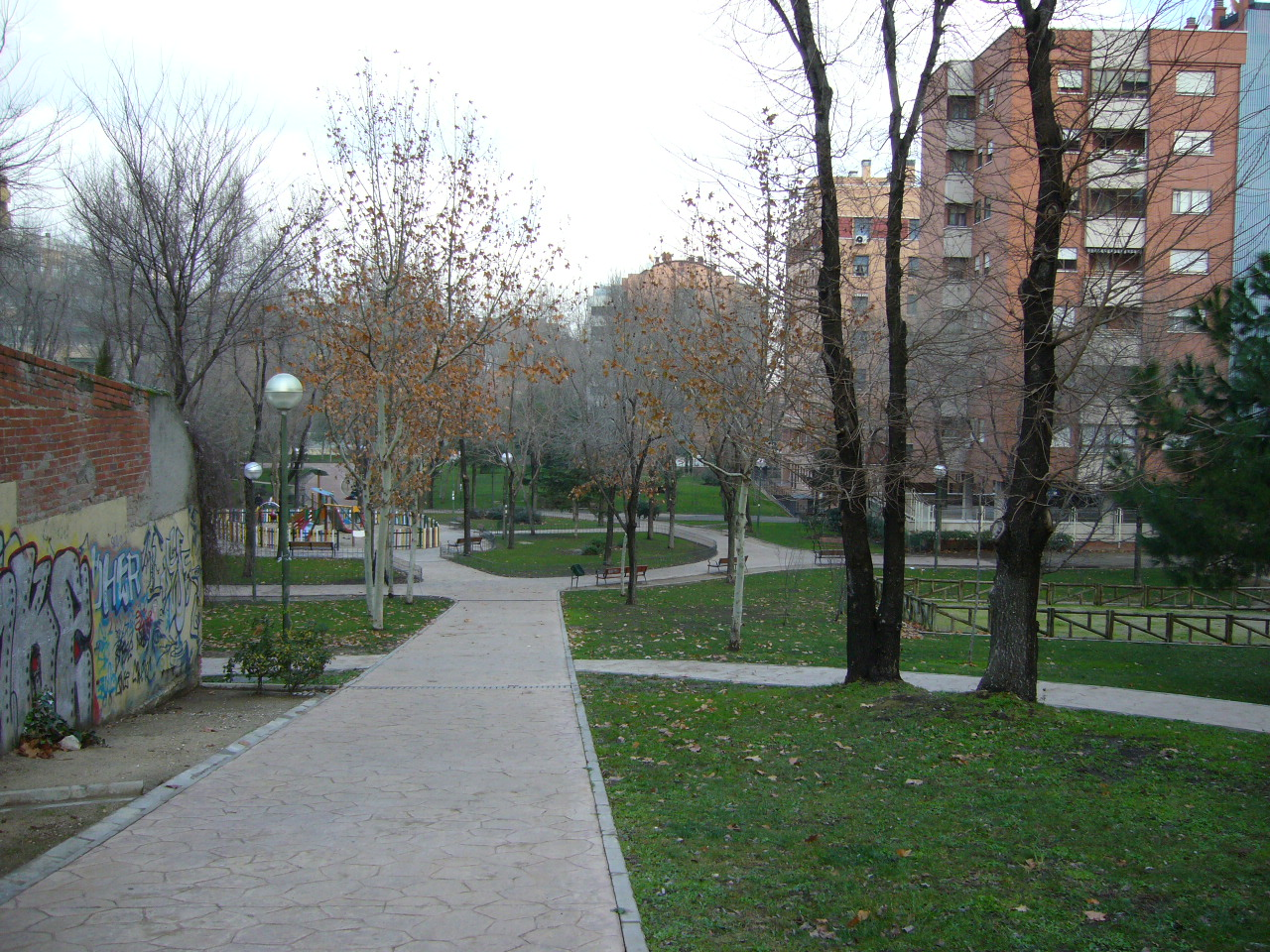 Parque en el barrio madrileño de Pinar de Chamartín, Ciudad Lineal